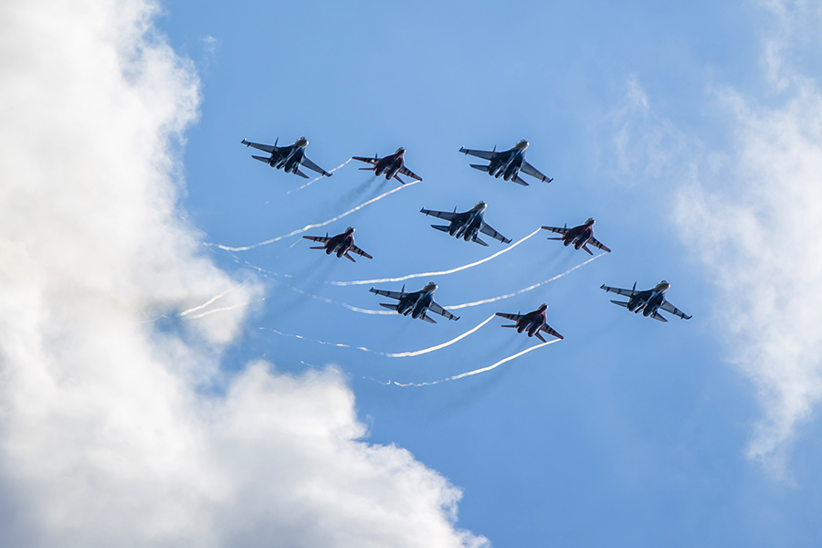 Тренировка экипажей ВКС, задействованных в Международном военно-техническом форуме «Армия-2016». Кубинка, Московская область, 2 сентября 2016.